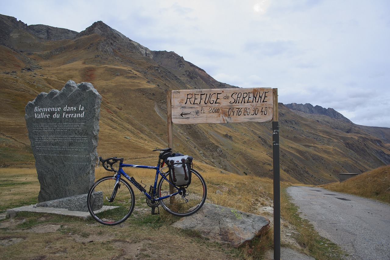 Col de Sarenne (1,999 m) è un passo che collega Mizoën all'Alpe d'Huez.